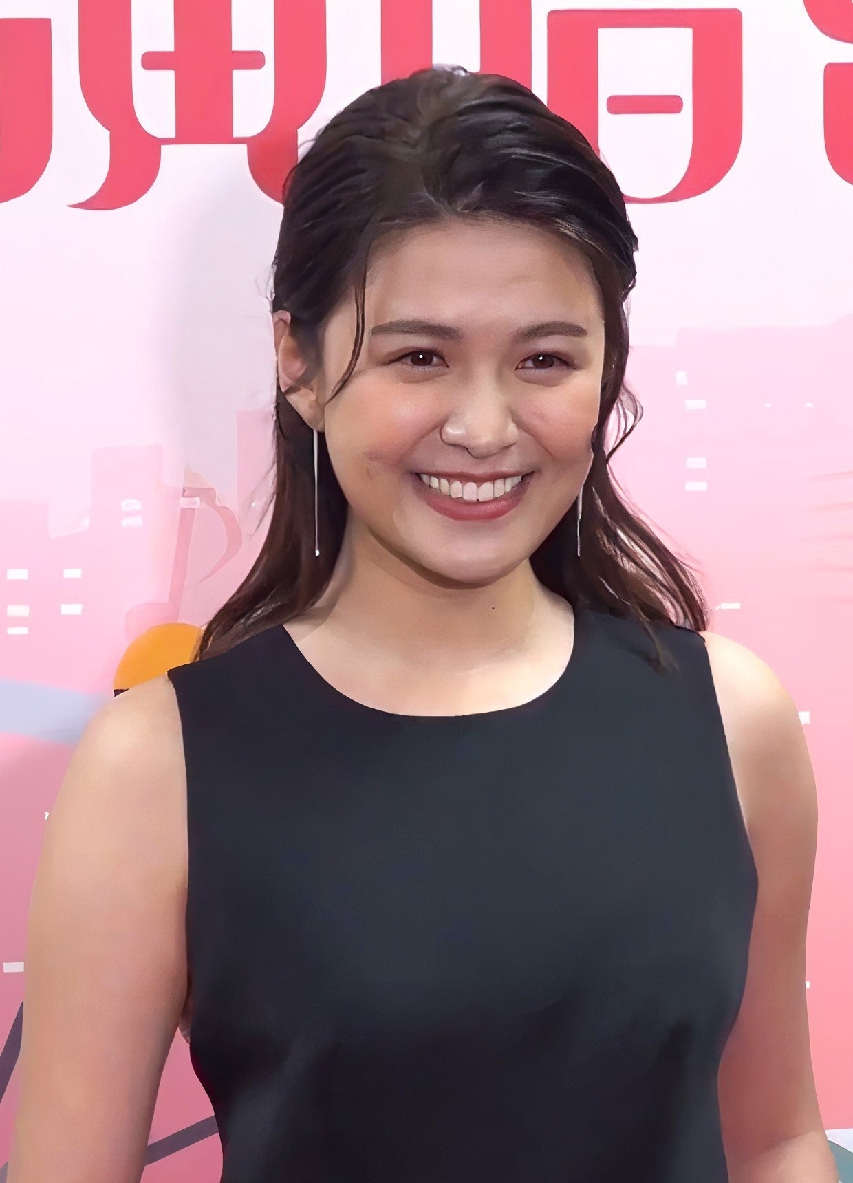 中文（香港）: 香港女演員及主持江嘉敏，主要活躍於電視劇、電影、微電影、音樂錄像、廣告等幕前演出